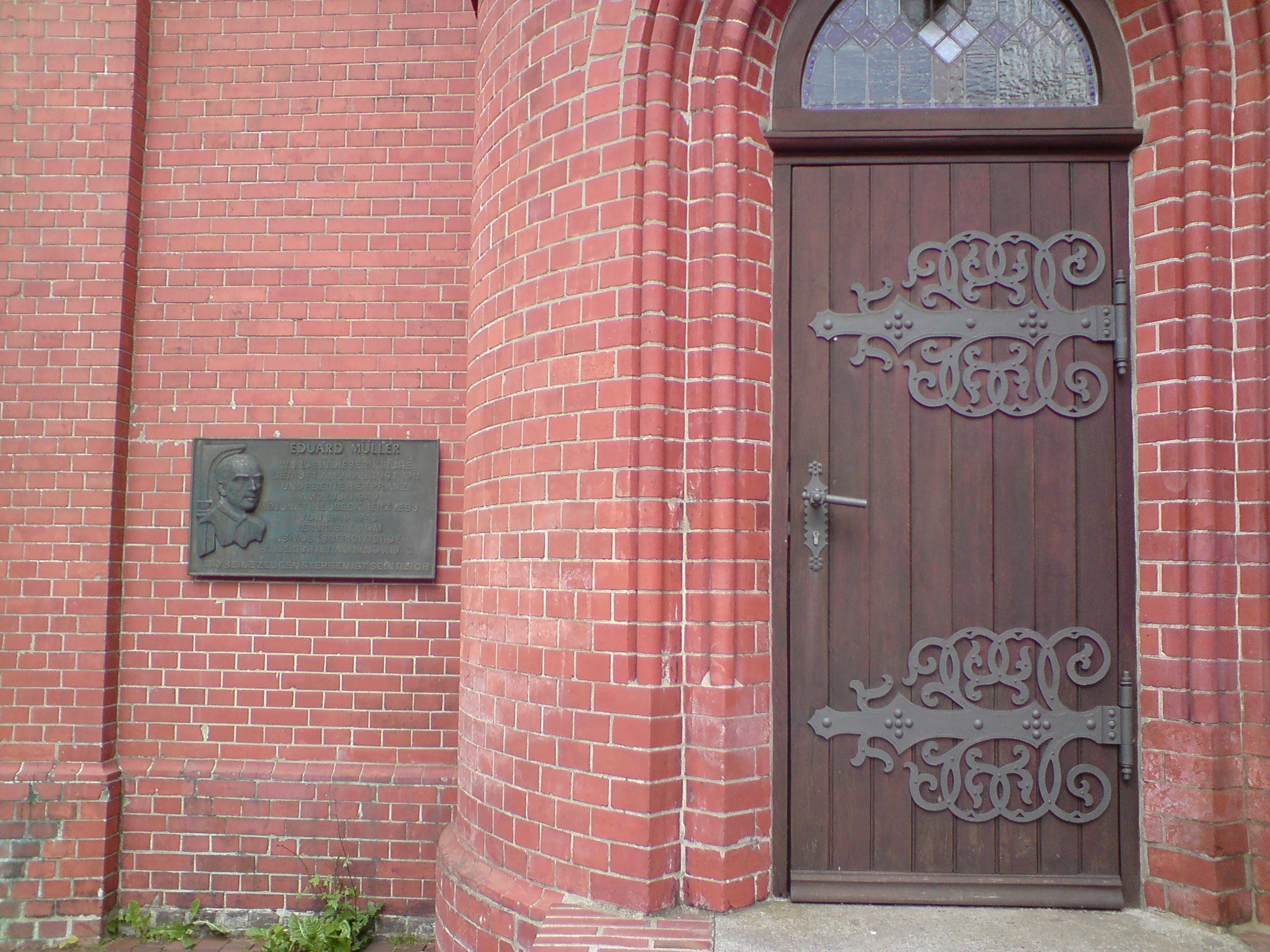 Haupteingang der St.Maria-St.Vicelin-Kirche mit Dedenkplatte von Eduard Müller